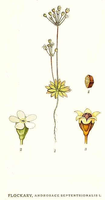 Original Description Flockarv, Androsace septentrionalis L.